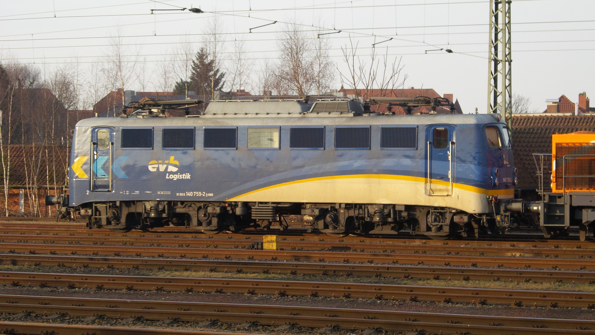 Elektrolokomotive 140 759 der Eisenbahnen und Verkehrsbetriebe Elbe-Weser im Bahnhof Nienburg (Weser)